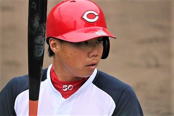 2017/11/7 天福球場